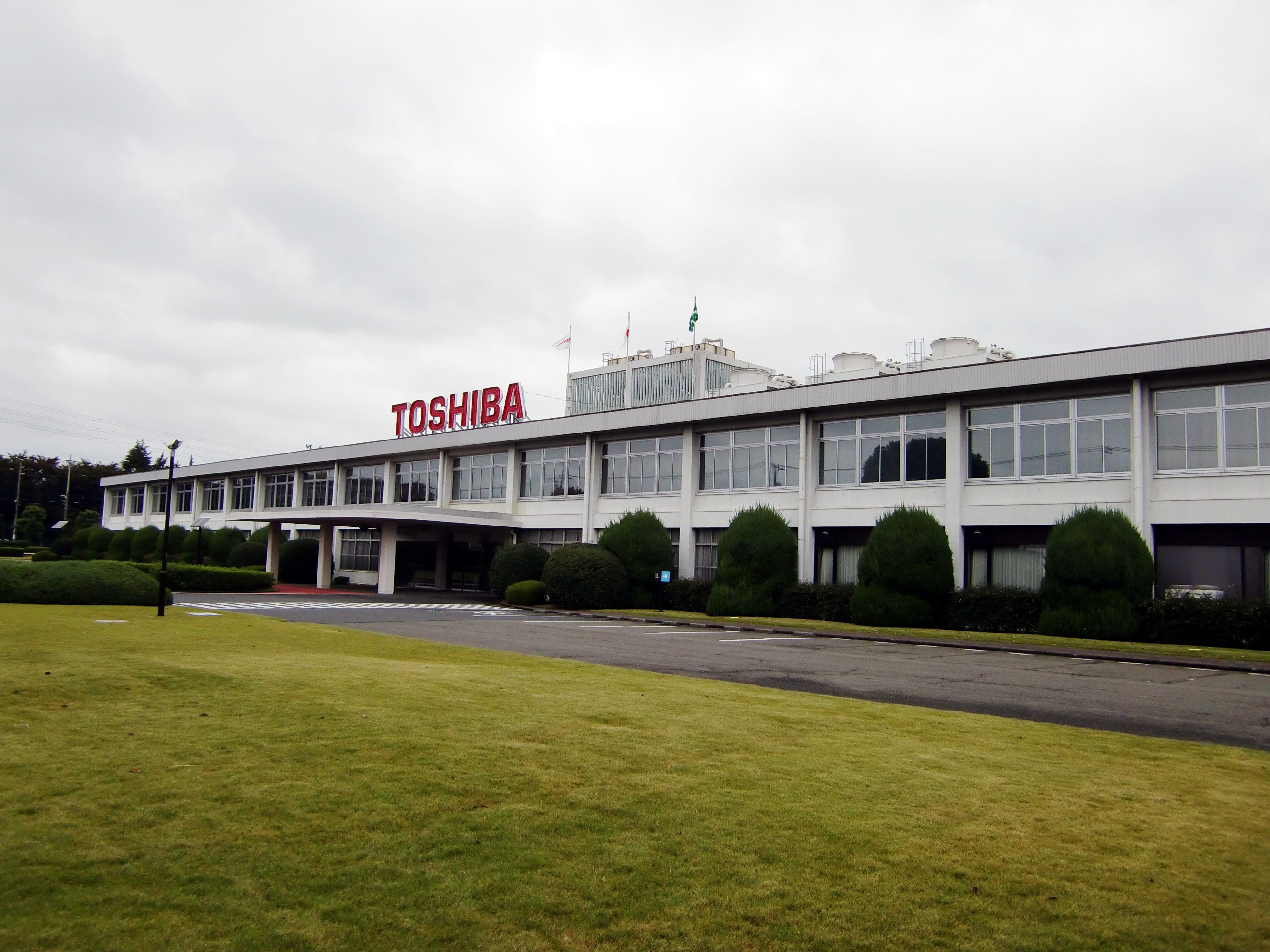 東芝青梅事業所外観